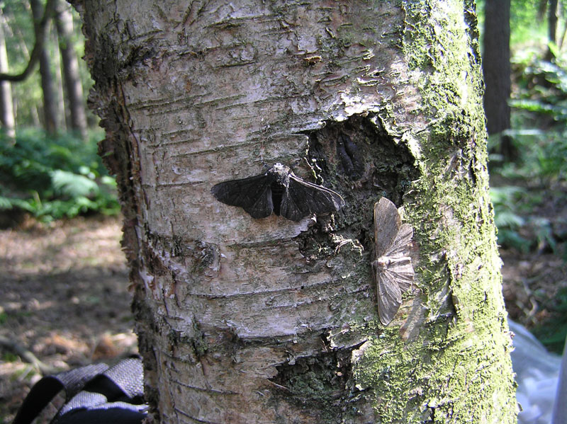 lichte en zwarte versie van berkenspanner (Biston betularia)